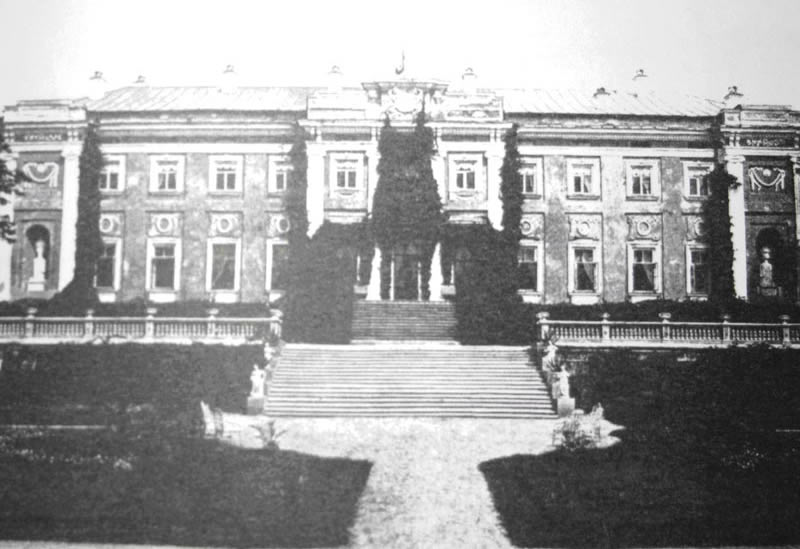 Мерчик. Садиба Є.М. Духовського.jpg: Мерчик. Садиба Є.М. Духовського / старовинна фотокартка